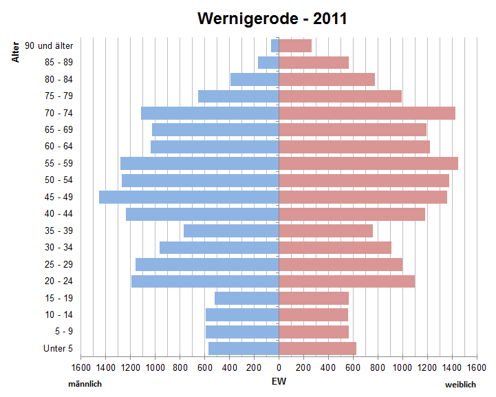 Bevölkerungspyramide der Stadt Wernigerode nach Zensus 2011.